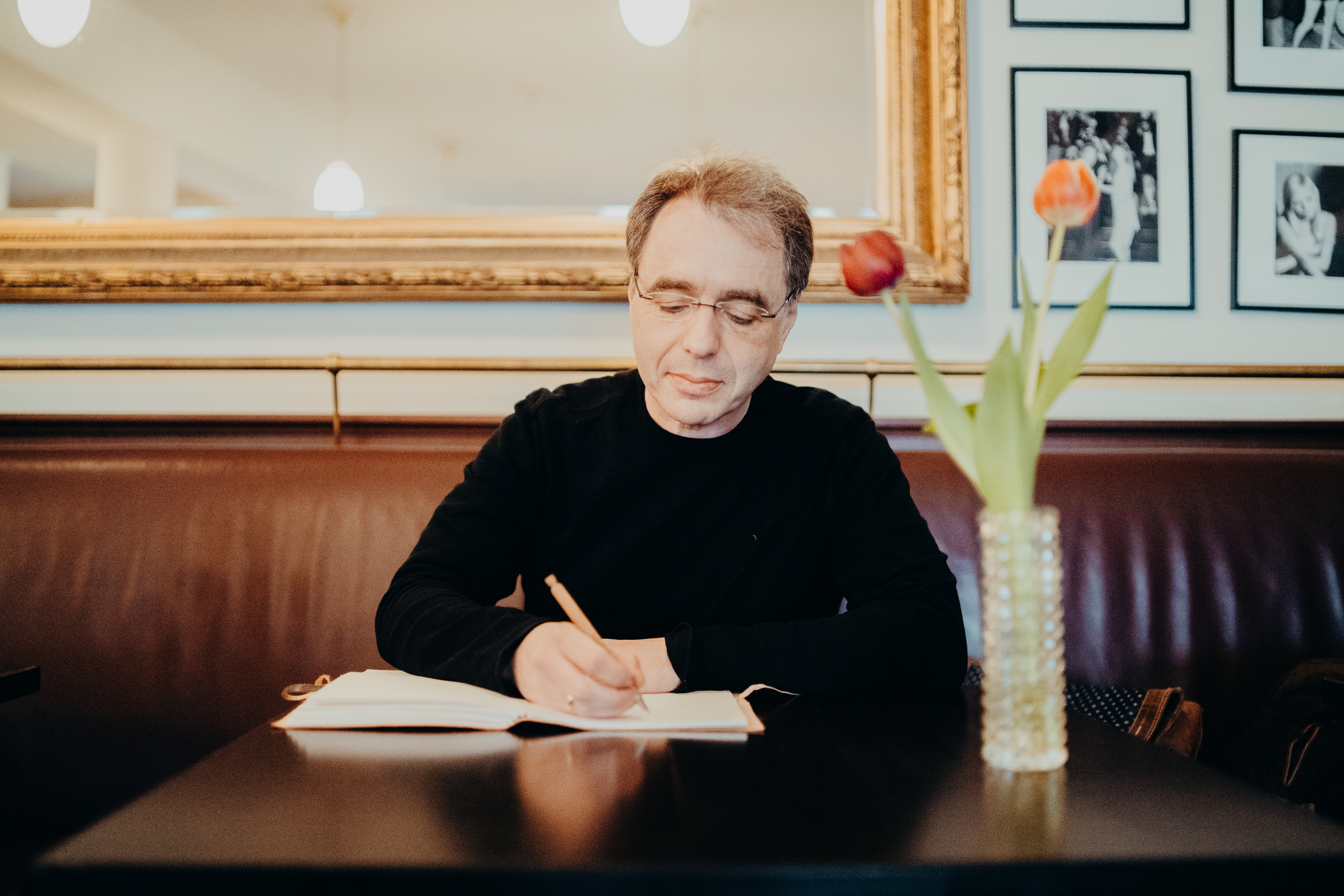 David Safier im Gondel Café in Bremen.